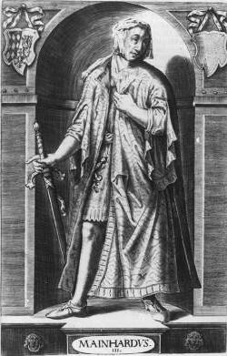 Graf Meinhard III. von Tirol, Herzog von Oberbayern; Stich